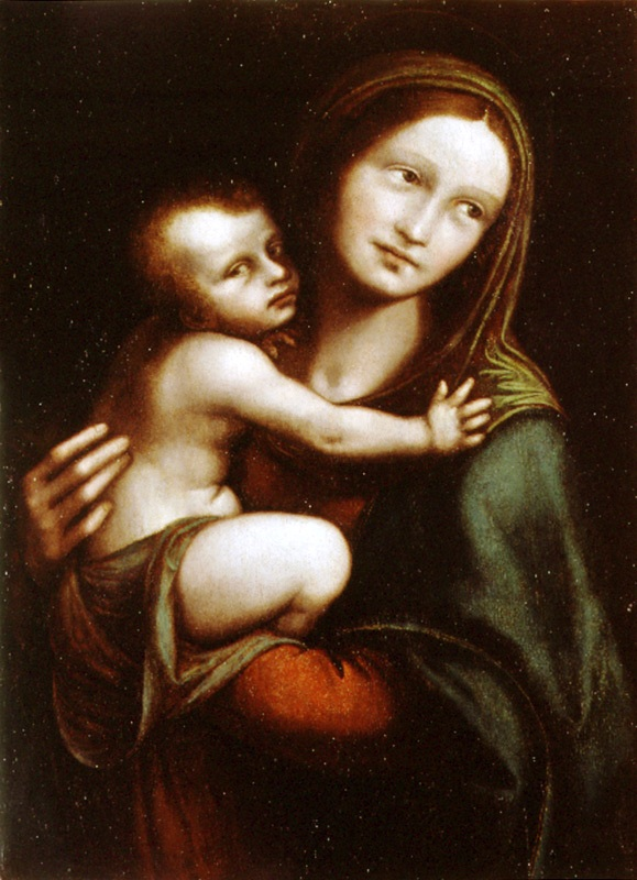 La obra representa a la Virgen María llevando en sus brazos a su hijo, el Niño Jesús.